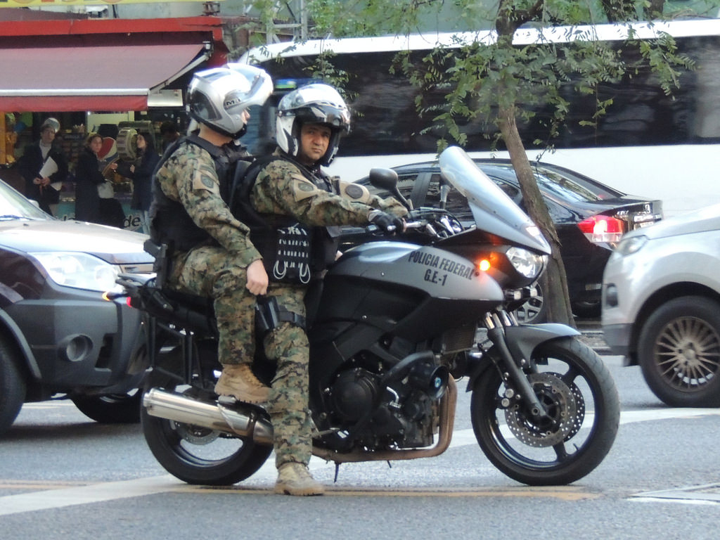 Efectivos motorizados del Grupo Especial GE-1 de la Policía Federal Argentina (PFA)